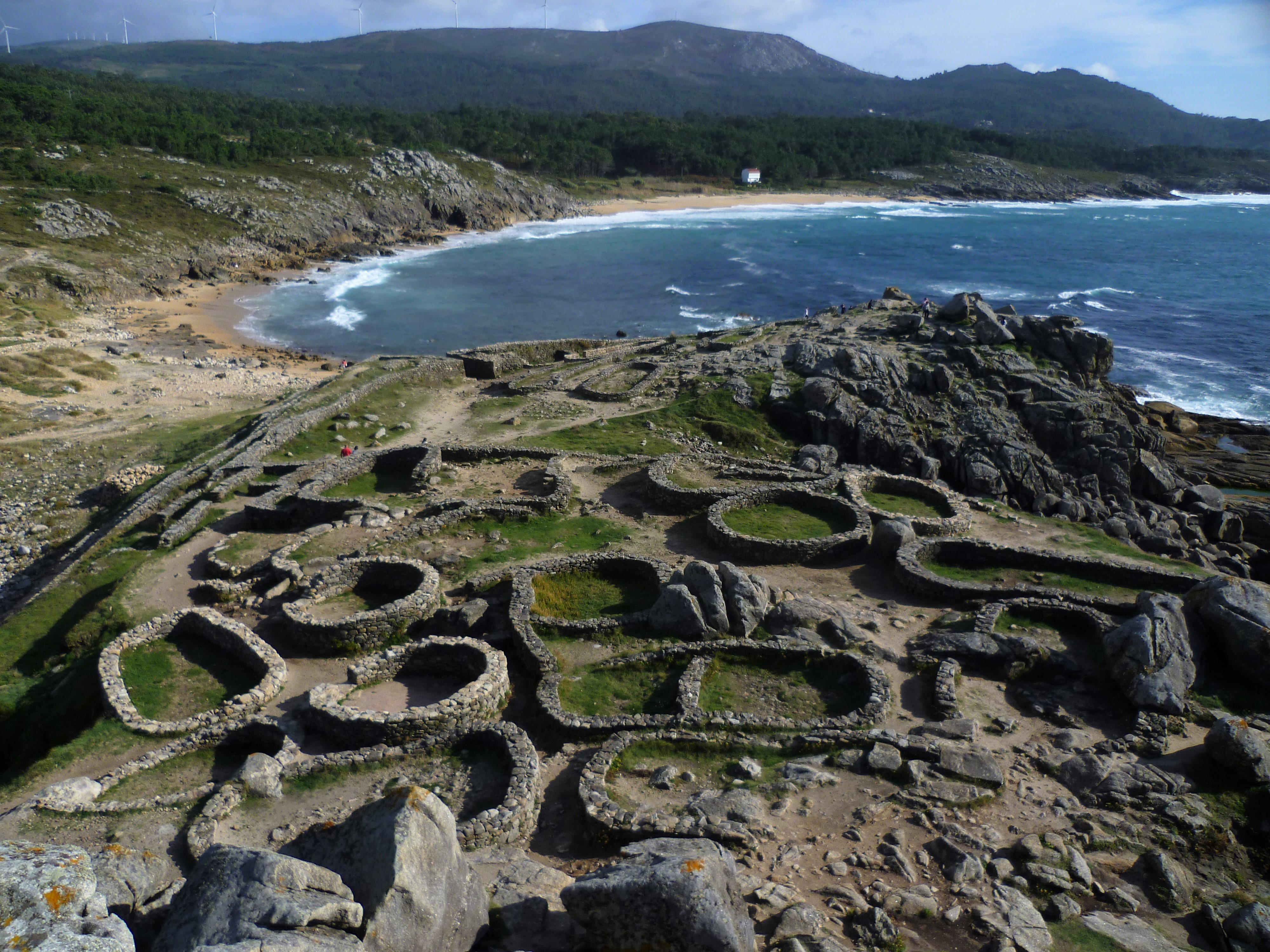 Complexo húmido de Corrubedo This is a photography of a Site of Community Importance in Spain with the ID: ES1110006. Natura2000 entry, EEA entry